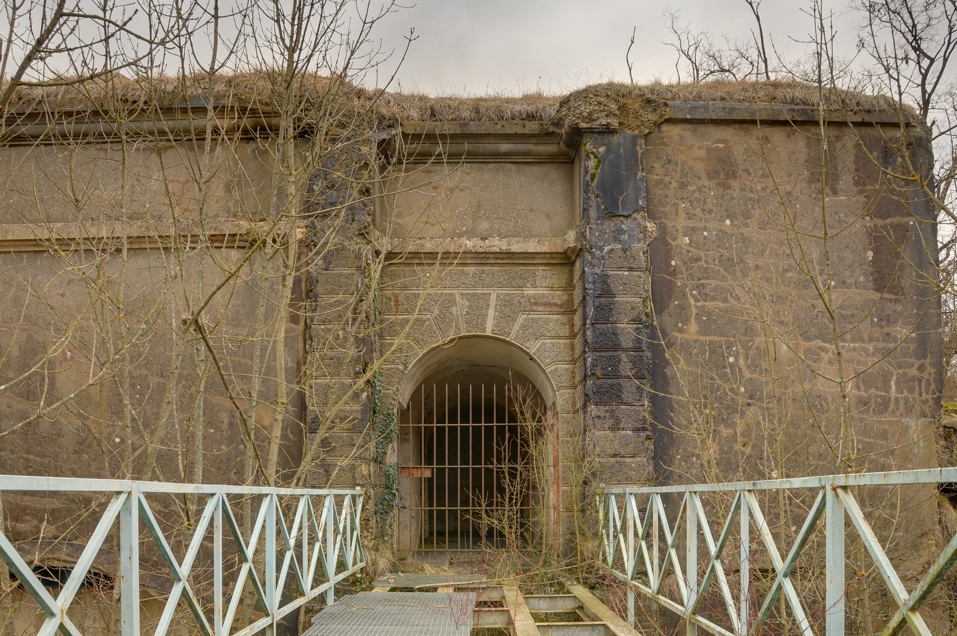 This photograph was taken with a Nikon D300 Ouvrage de Chèvremont : l'entrée (HDR).